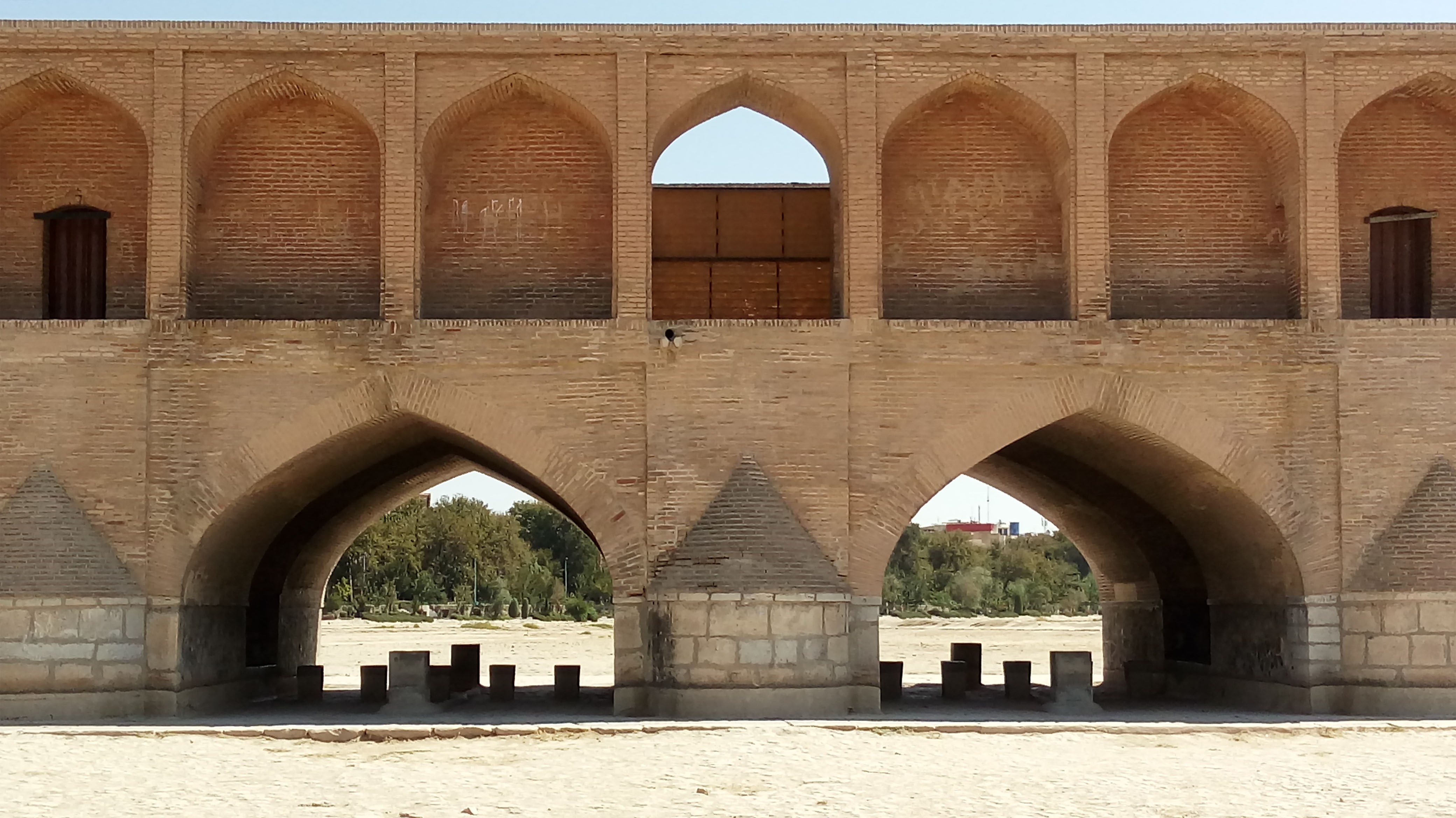 پل الله وردیخان/ سی‌وسه پل/ پل جل